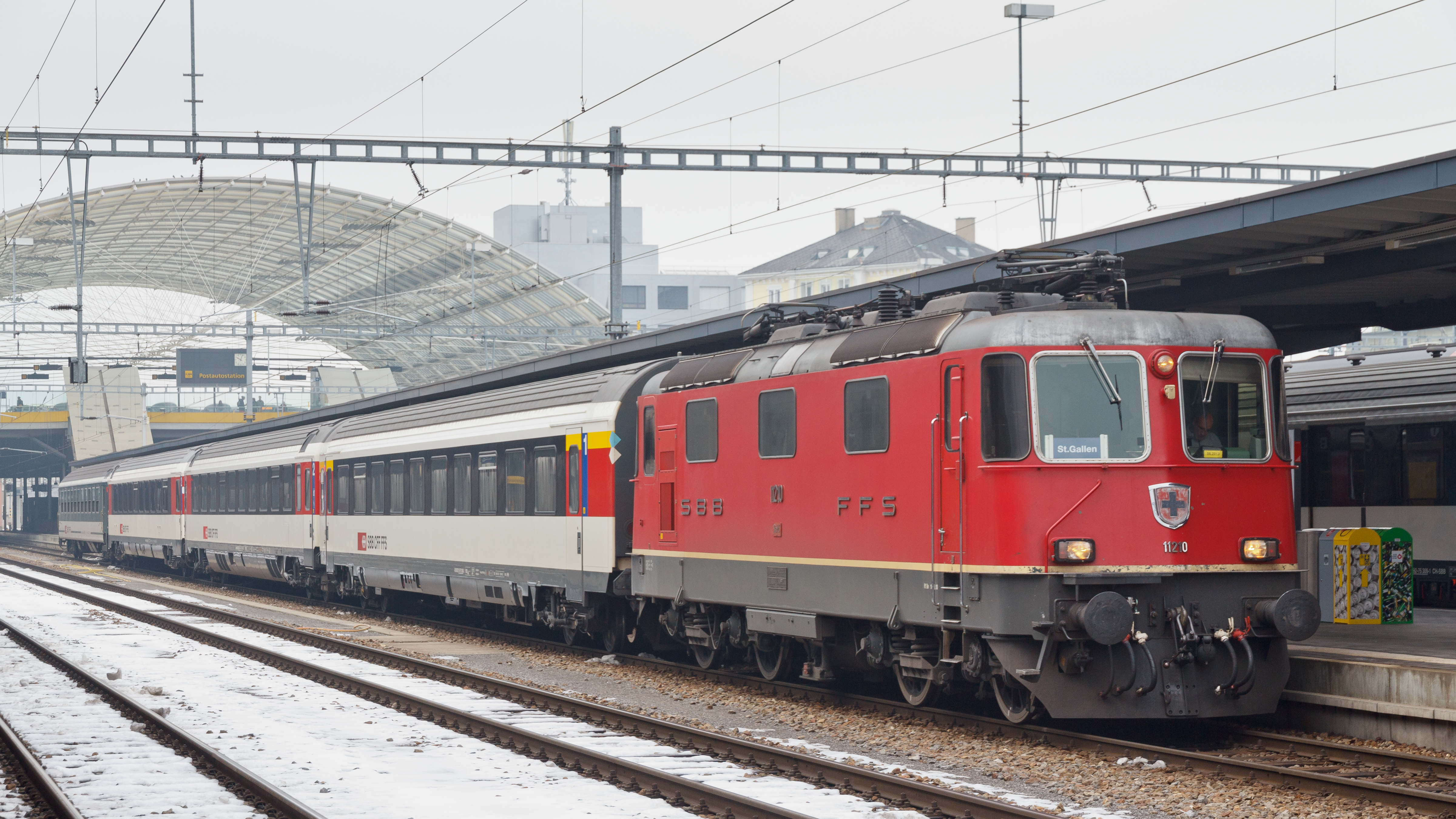 Der kurze "Rheintal-Express" nach St. Gallen im Bahnhof Chur